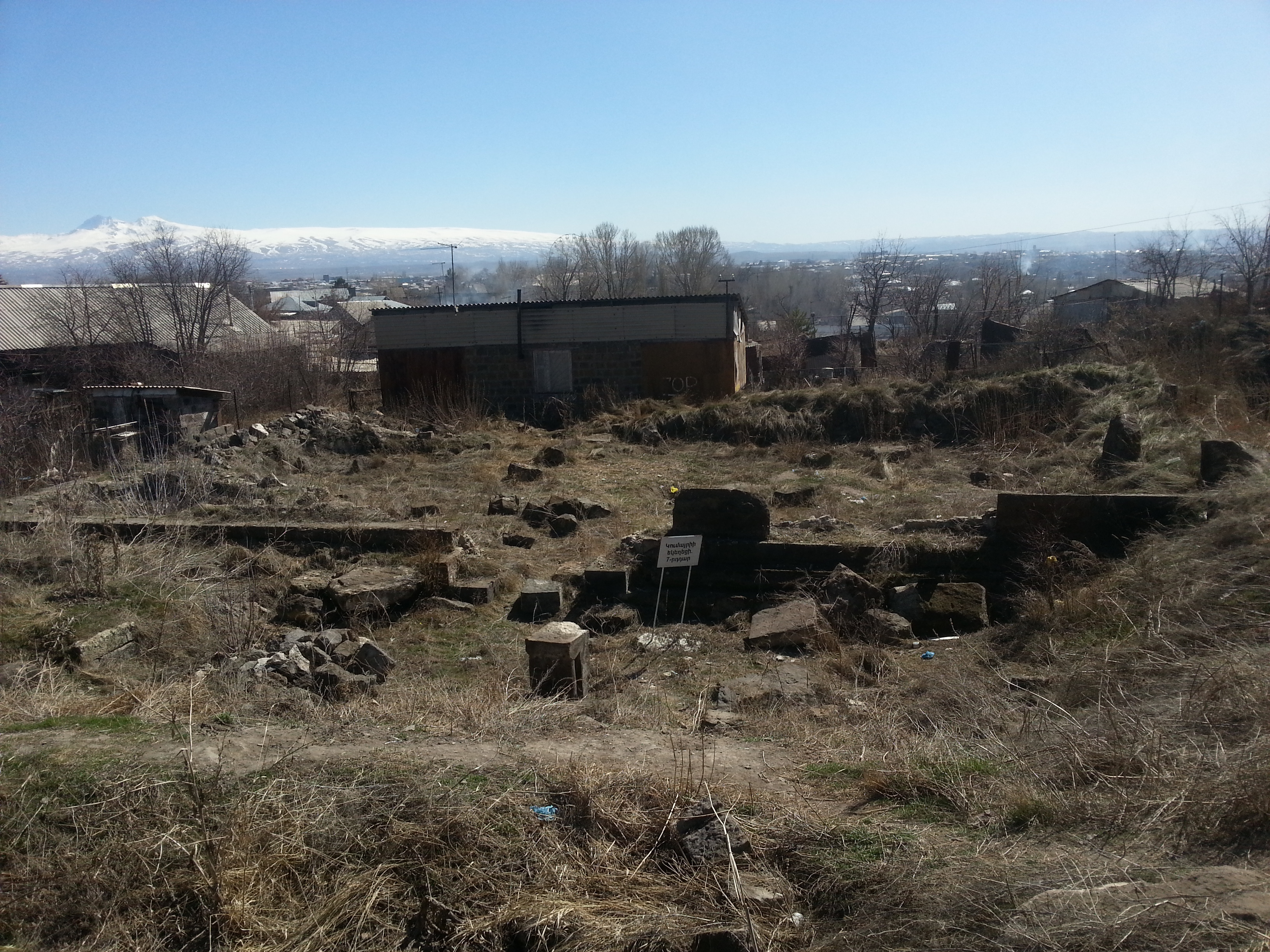 Կումայրի եկեղեցու ավերակները